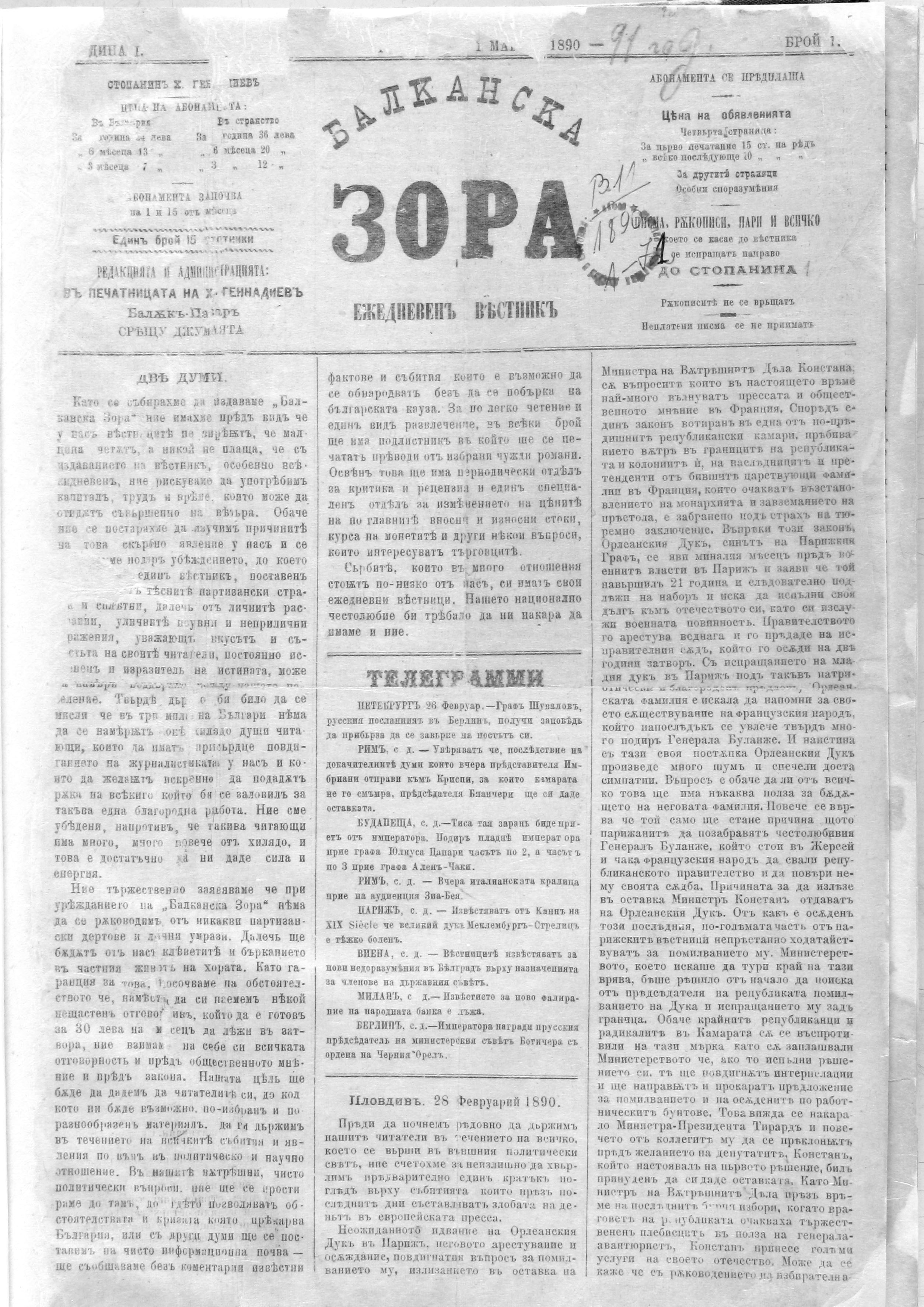 Главата на вестник Балканска зора, брой 1, 1 март 1890 година.